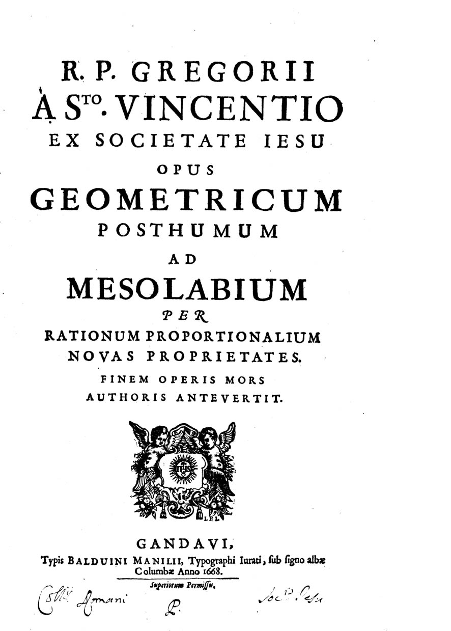 R.p. Gregorii a S.to Vincentio ... Opus geometricum posthumum ad mesolabium per rationum proportionalium novas proprietates. Finem operis mors authoris antevertit. - Gandavi : typis Balduini Manilii, typographi iurati, sub signo albae columbae, 1668. - [20], 297, [i.e. 291, 1] p., [1] c. di tav. calcogr. : ill. ; fol .